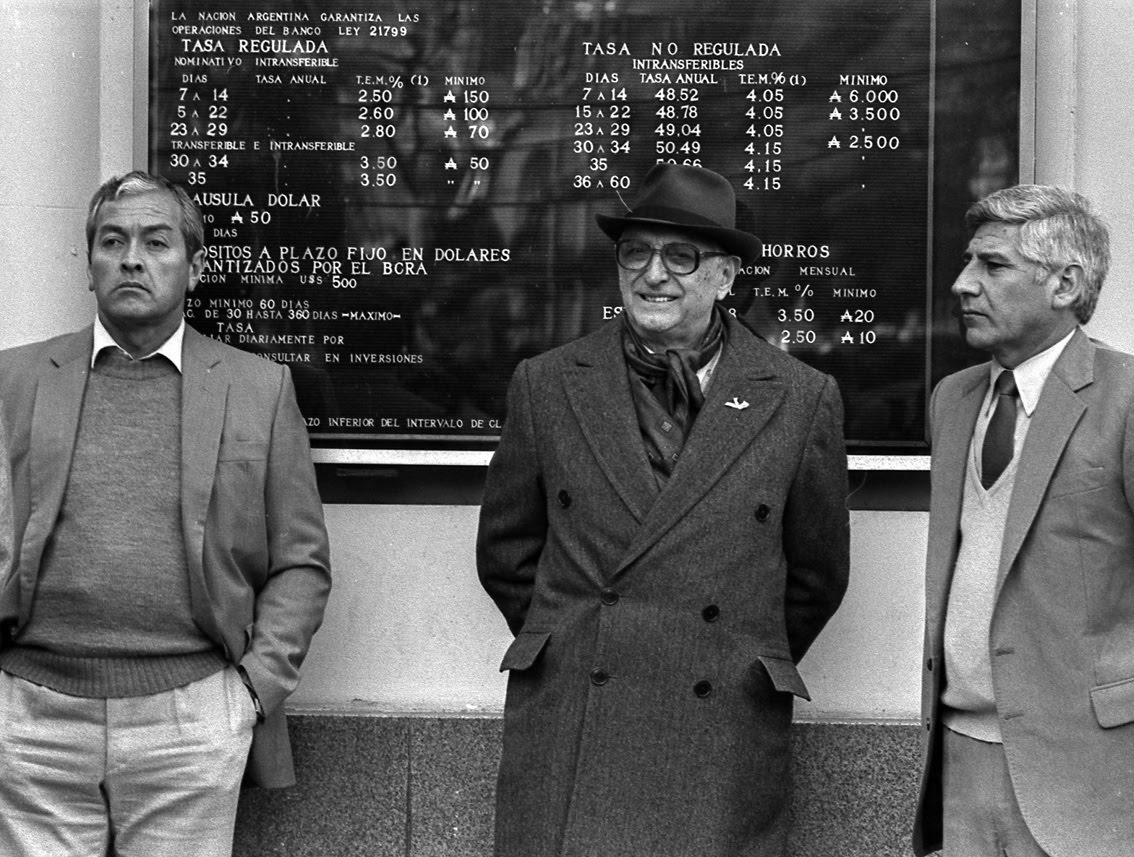 Es una foto del expresidente Arturo Frondizi (en el medio), junto a unas personas que había en la calle.